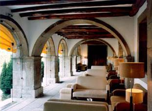 Museu Romântico da Quinta da Macieirinha / Solar do Vinho do Porto. Localizado junto ao Palácio de Cristal, freguesia de Massarelos, Porto, Portugal.